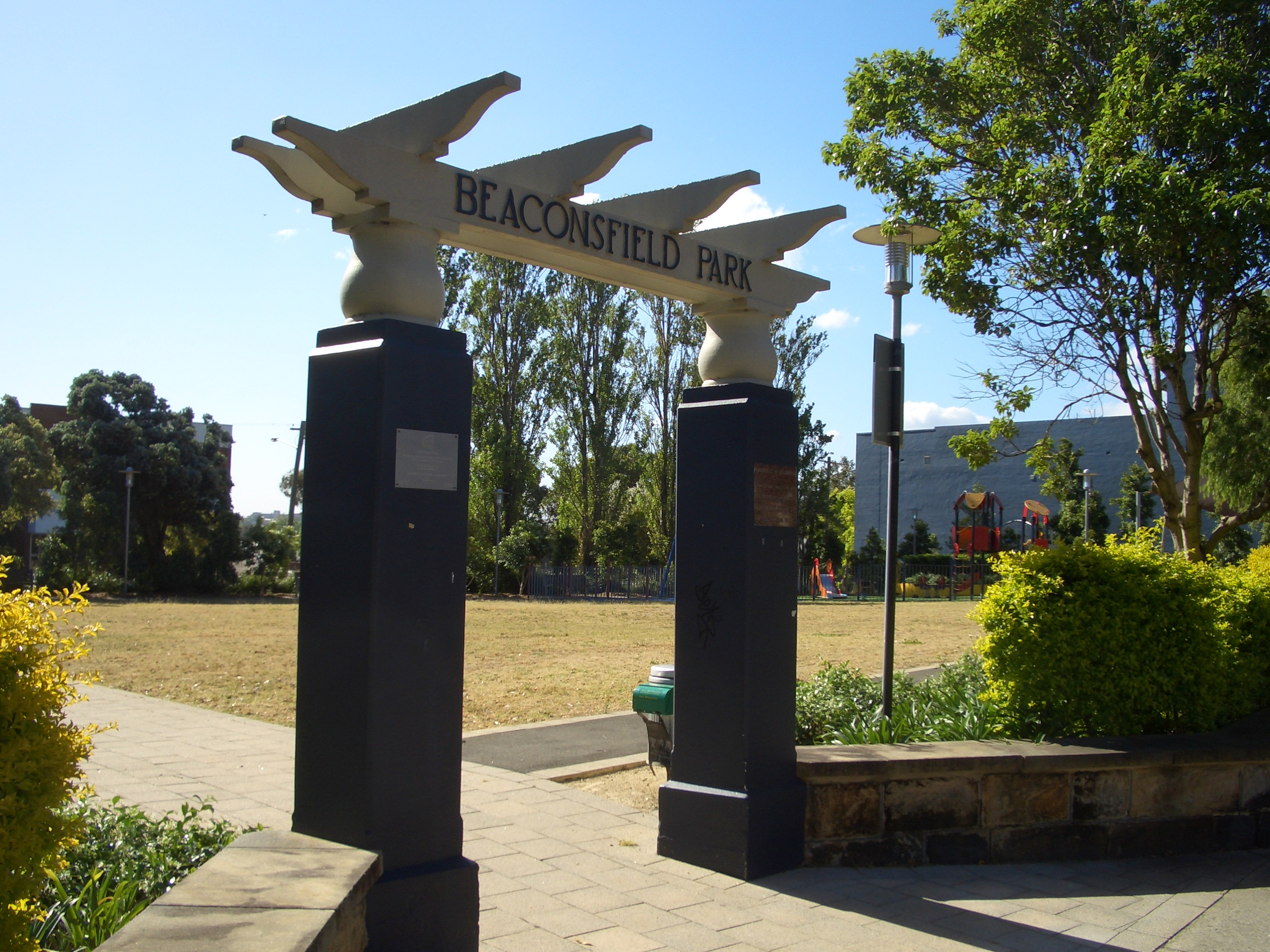 Beaconsfield